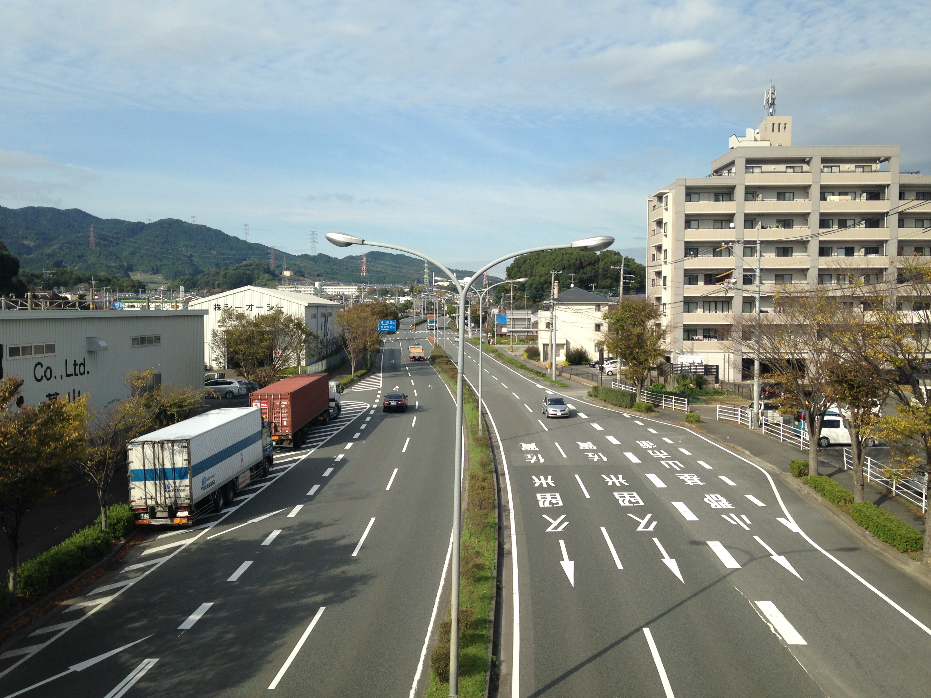 基山駅東側の歩道橋より望む国道3号(筑紫野市方面)